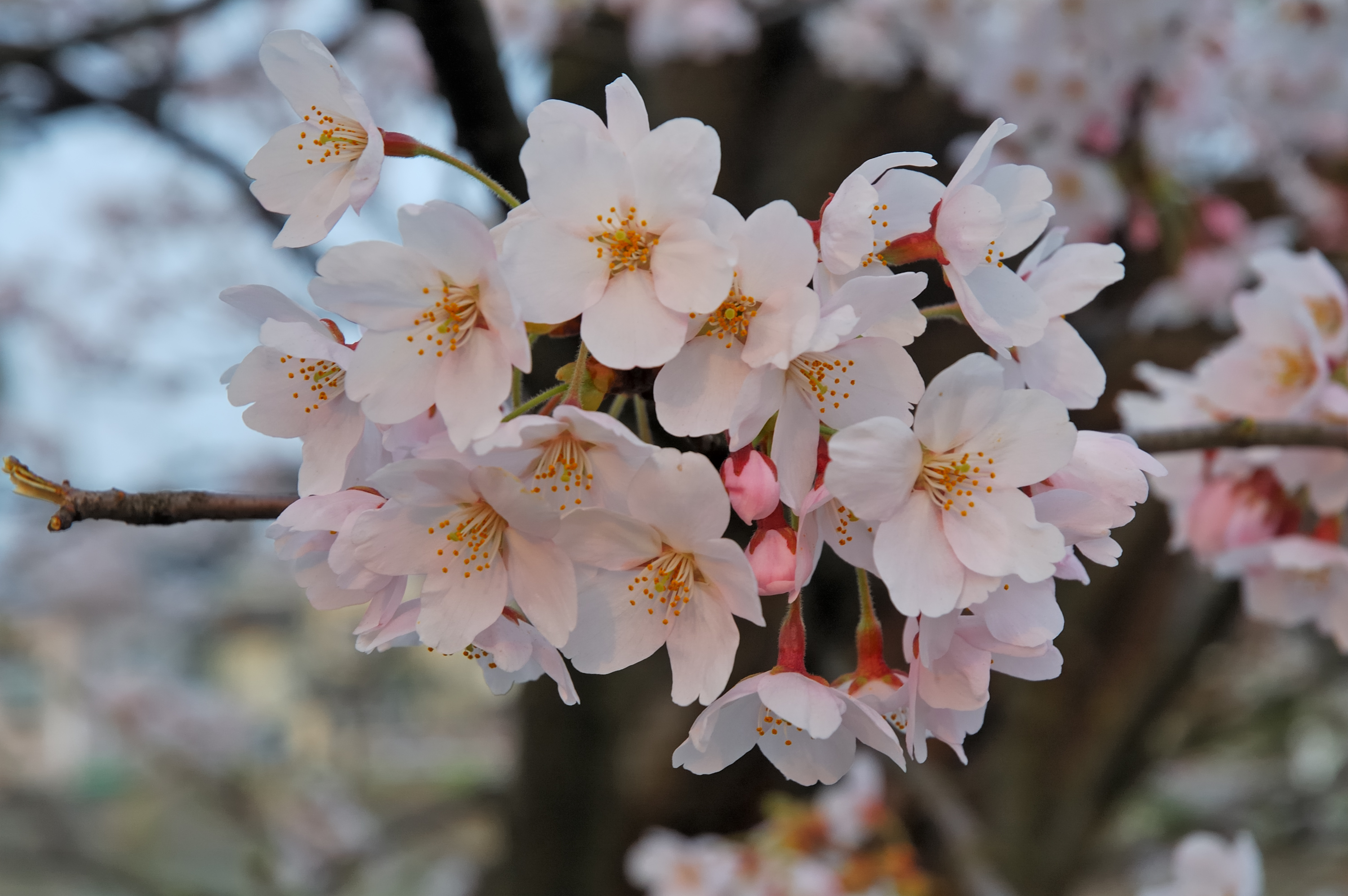 Sakura of Fukushima-e (福島江のサクラ)